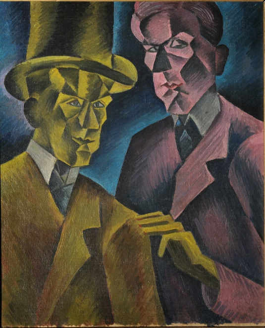 Bohumil Kubišta: Dvojník, 1911